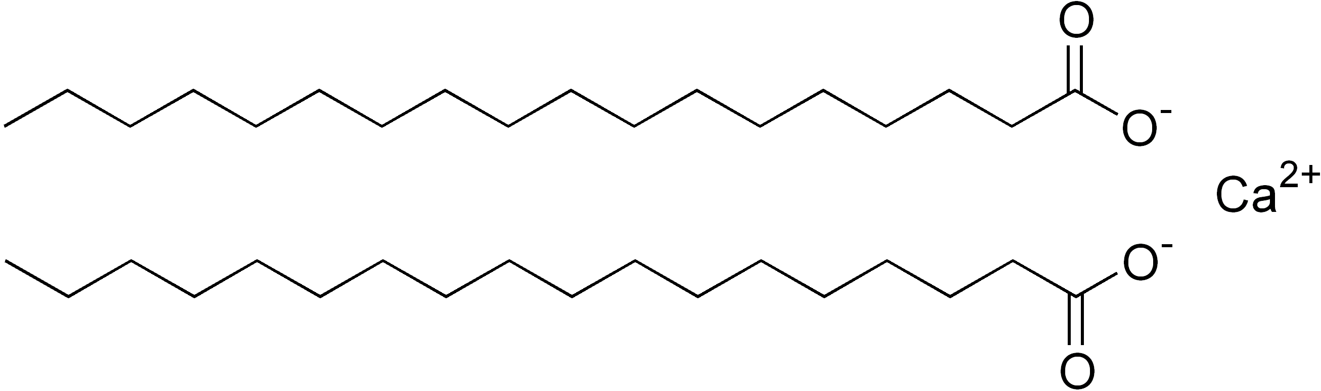 chemical structure of calcium stearate